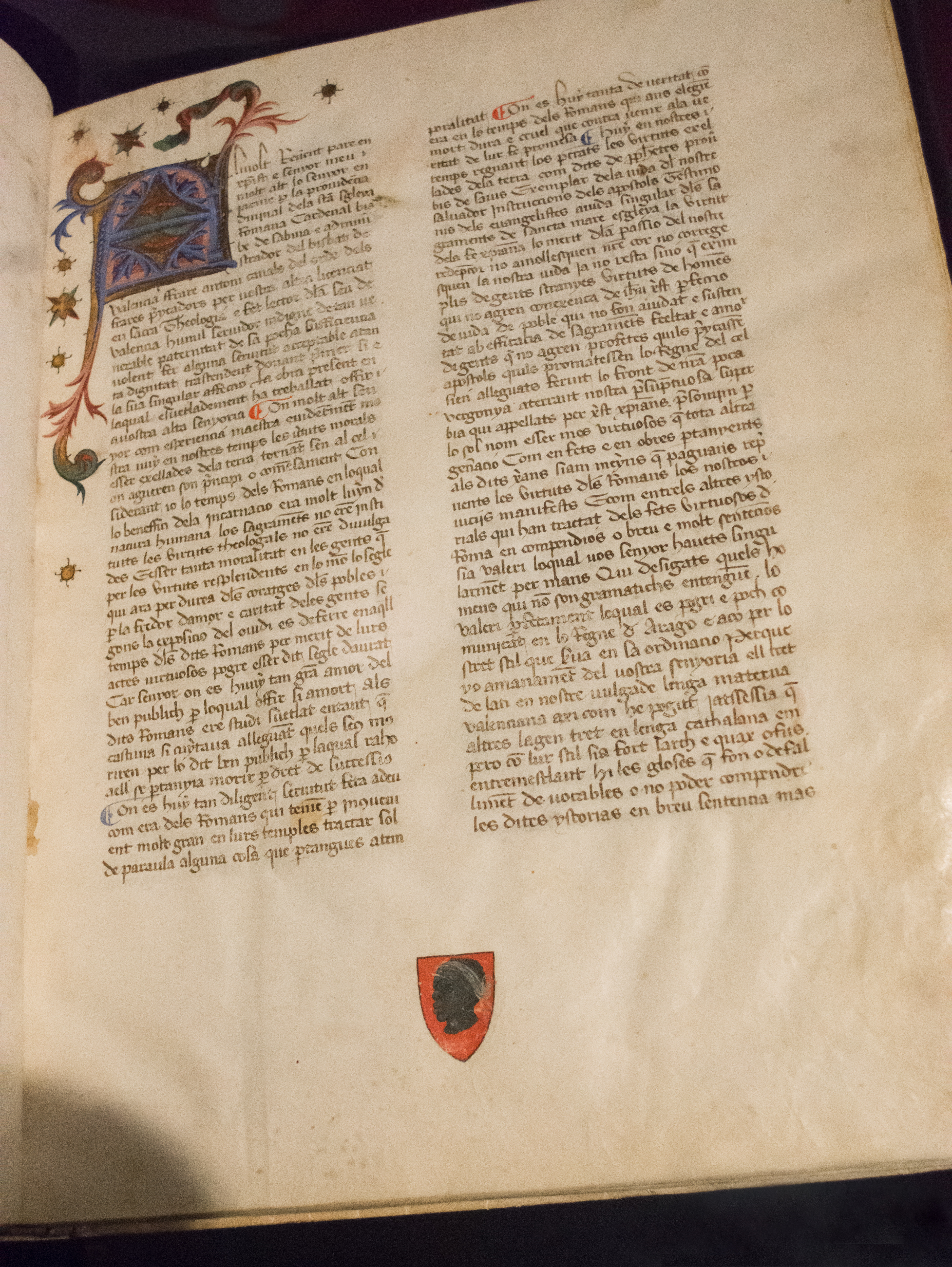 Manuscrito con los nueve libros de Factorum et dictorum memorabilium de Valerio Máximo, traducido al catalán por el fraile Antonio Canals, entre 1395 y 1415. 162 folios, 335 x 260 mm, encuadernación 345 x 265 mm. Pergamino. Escritura gótica cursiva. Procedencia: Biblioteca del marqués de Dos Aguas. Universidad de Valencia. Biblioteca Histórica. BH Ms. 285.